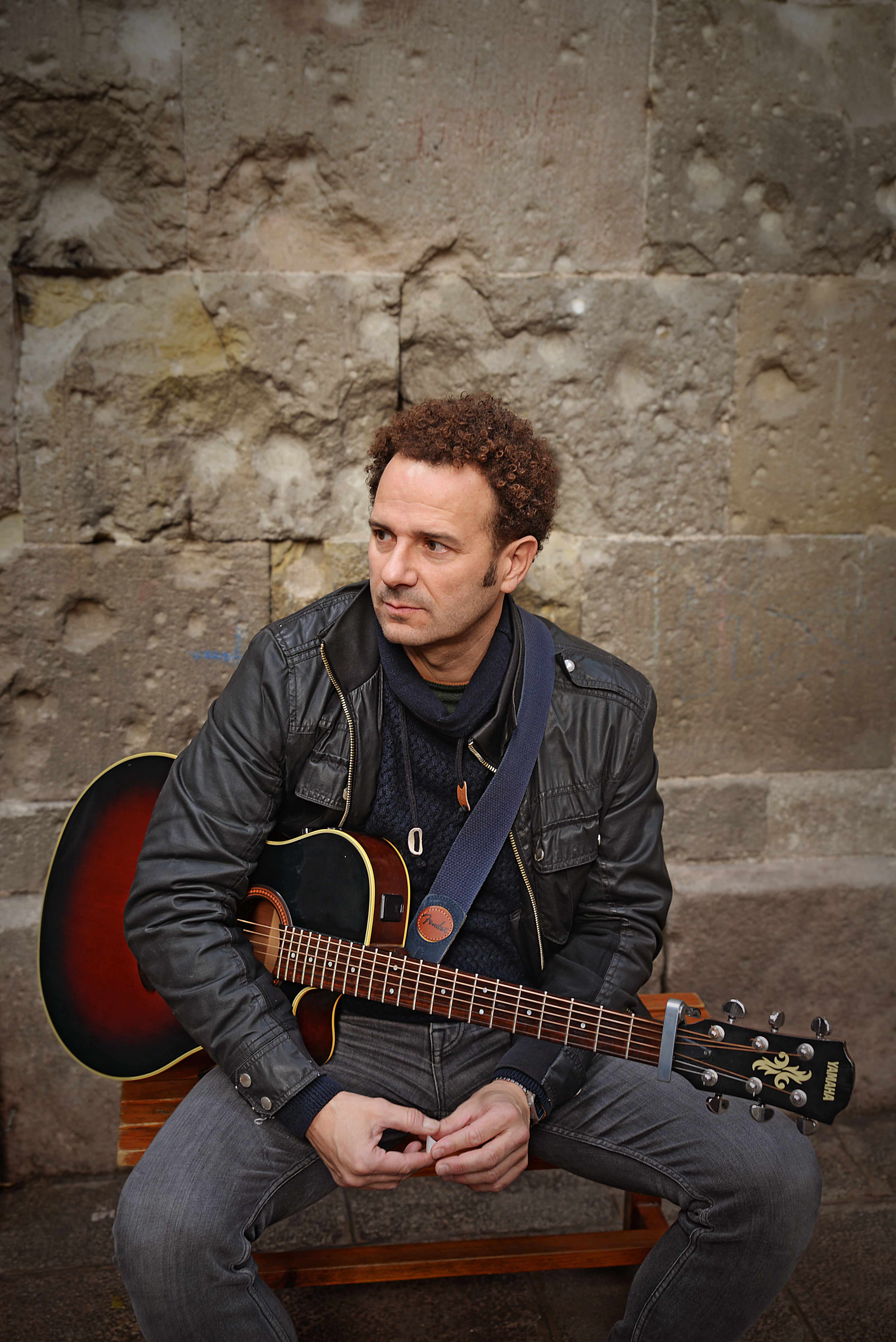 Marc Martínez